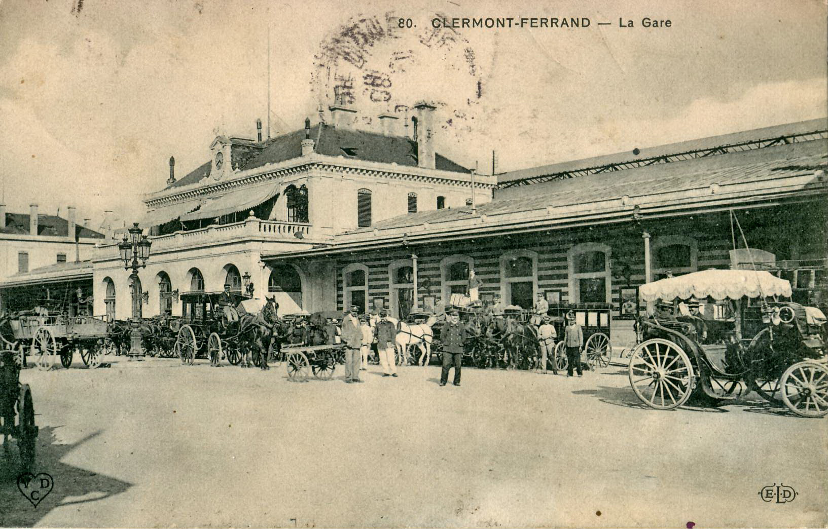 Carte postale ancienne éditée par ELD N°80 CLERMONJT-FERRAND : La Gare